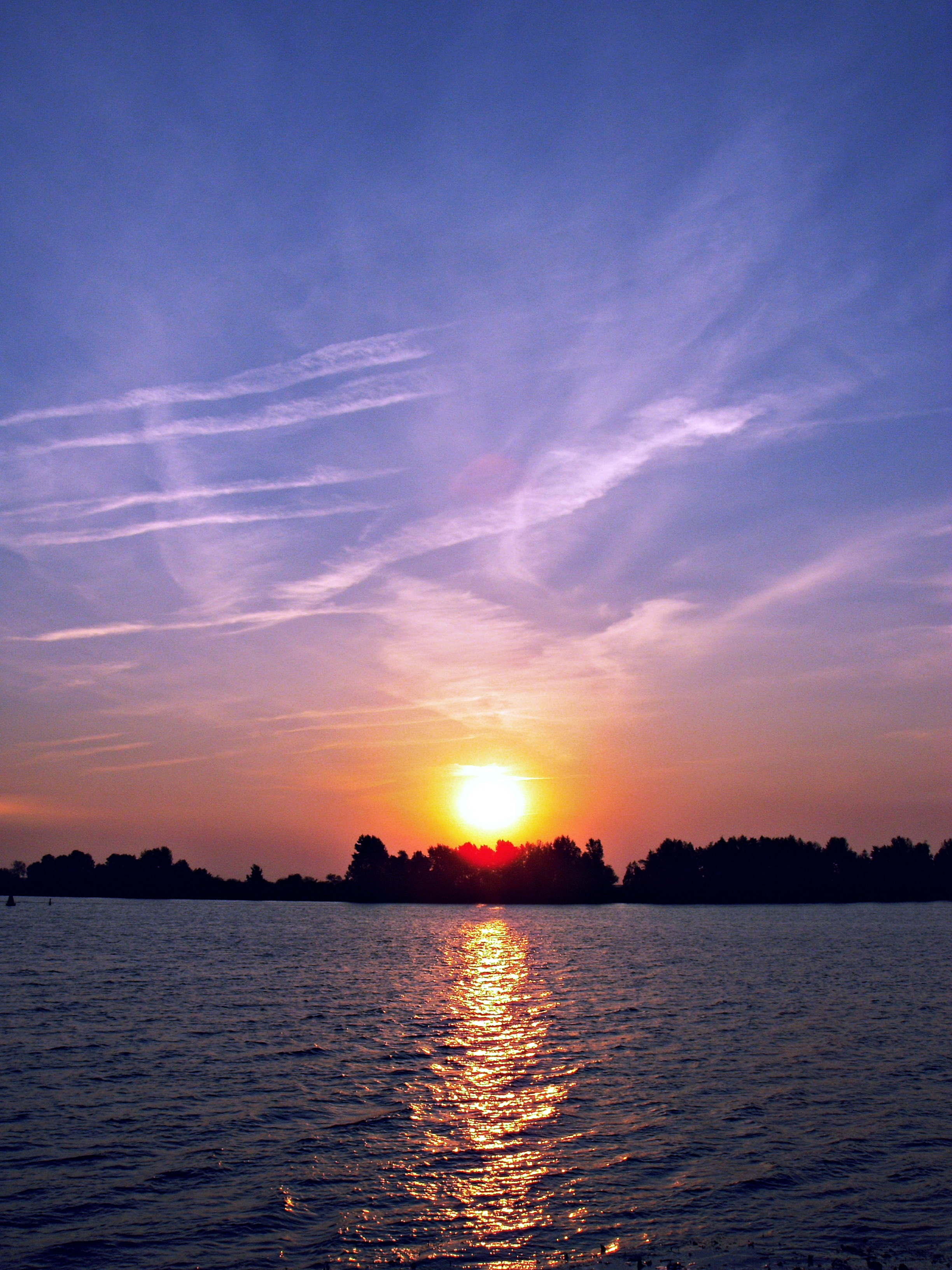 Ukrainka, Kyivs'ka oblast, Ukraine